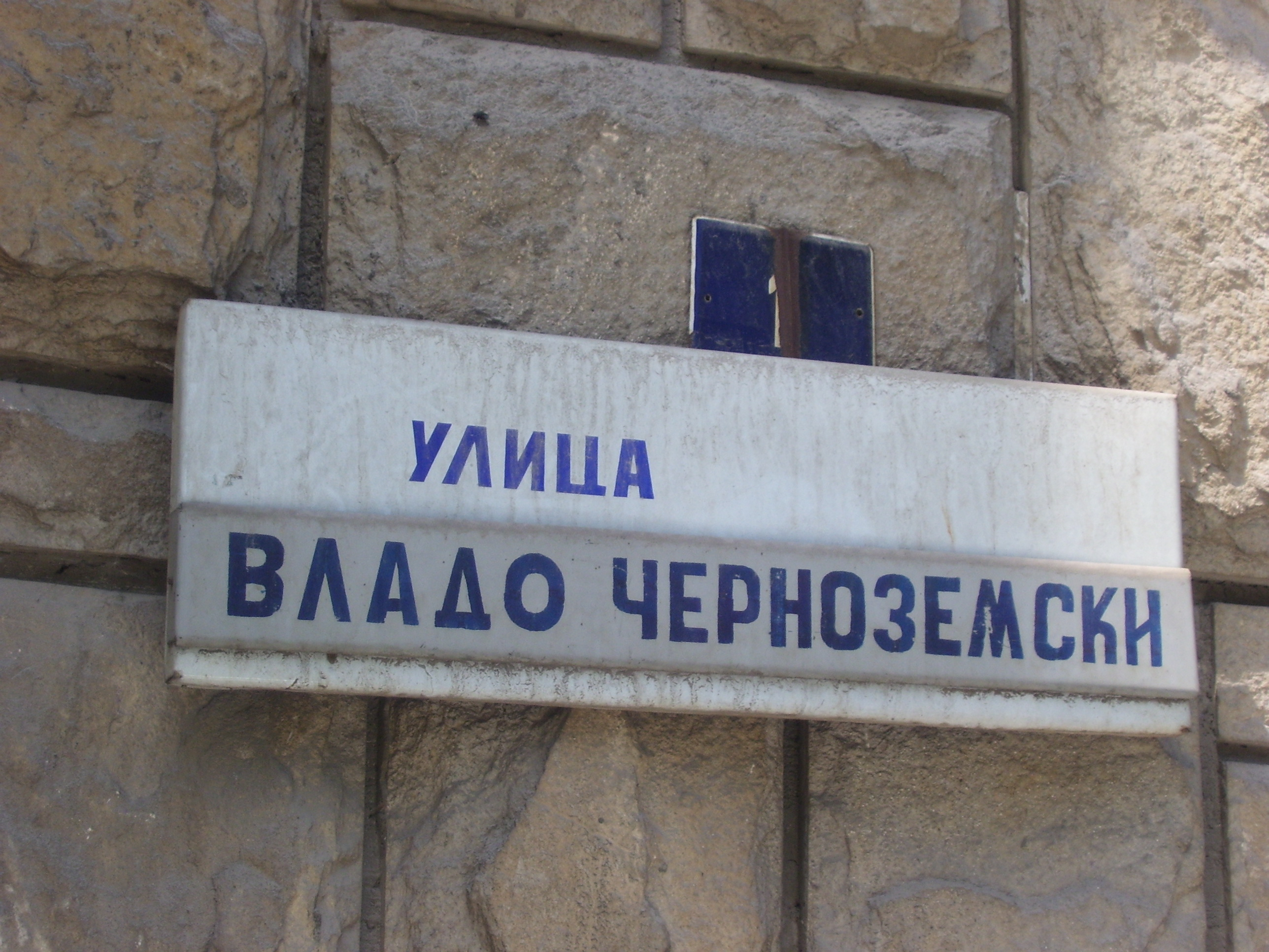 Улица "Владо Черноземски" в родната му Каменица.